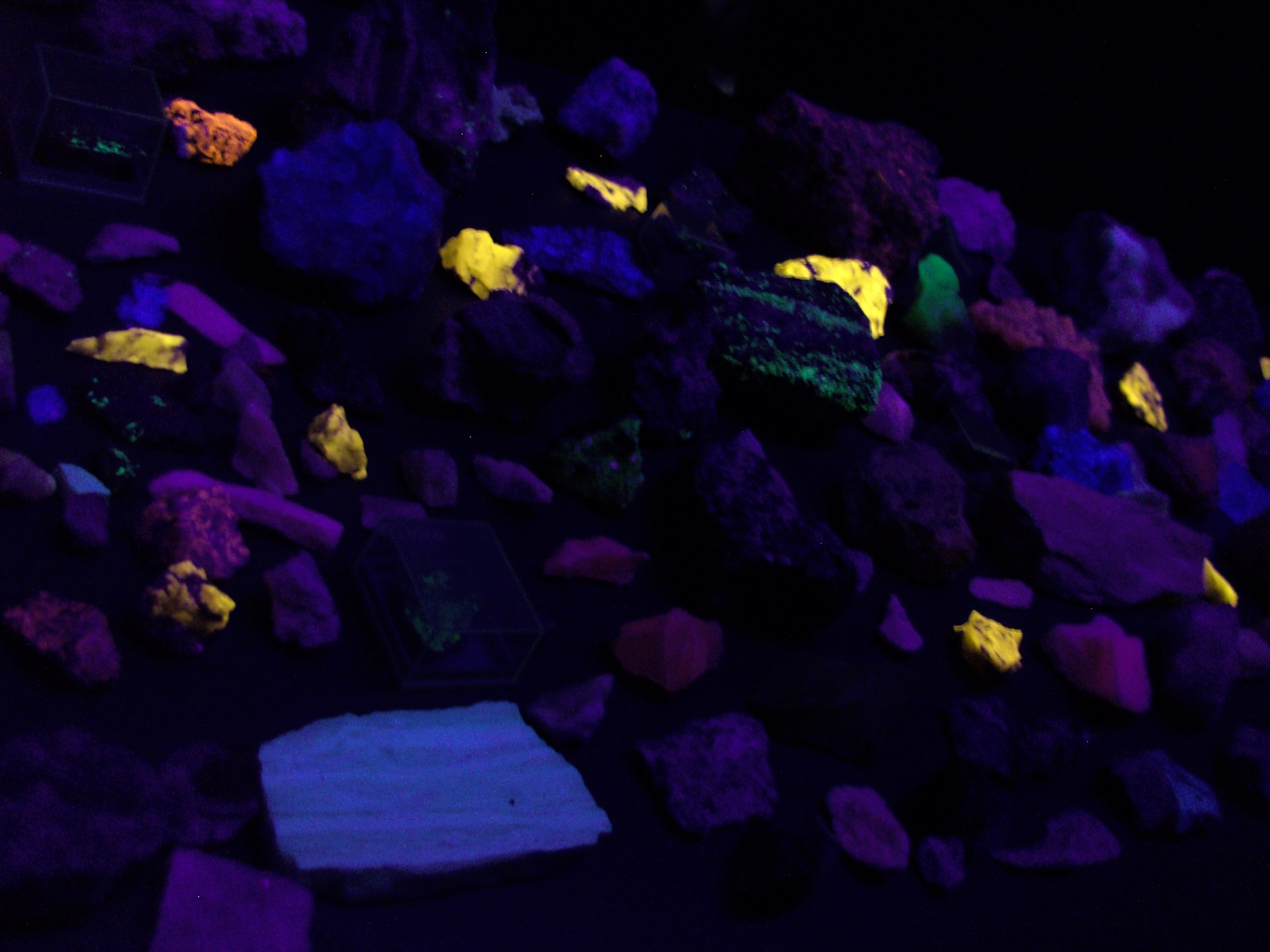 Die Gesteinssammlung der Ausstellung „Steinwelten“ im Granitzentrum Hauzenberg umfasst eine Vielzahl verschiedener Steine aus aller Welt. Durch Lichtanregung (mit verschiedenen Wellenlängen) wird Lumineszenz der Mineralen hervorgerufen.